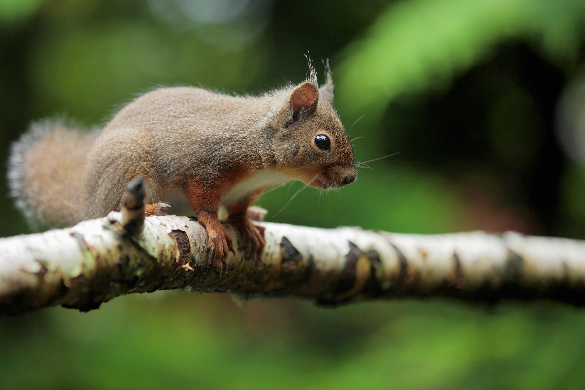 ニホンリスです。